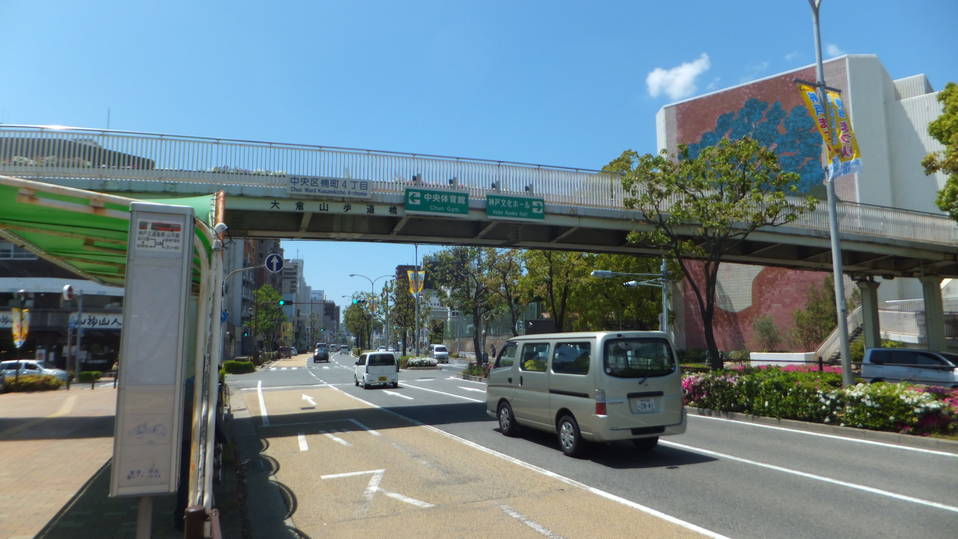 兵庫県神戸市中央区楠町4丁目